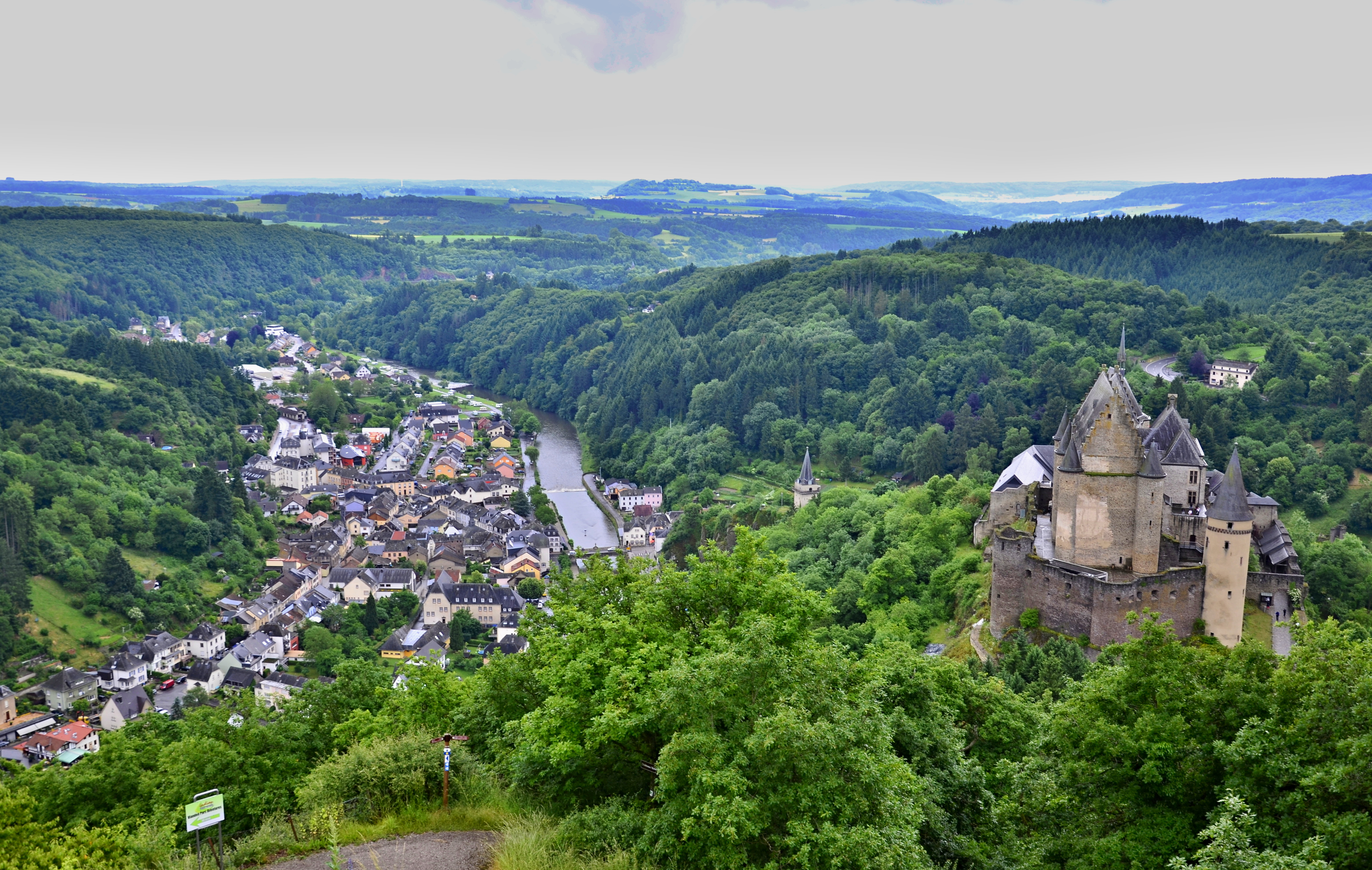 Vianden Castle